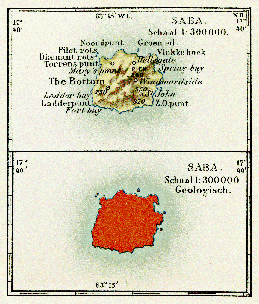 Saba - Karte aus der Enzyklopädie der Niederländischen Antillen.